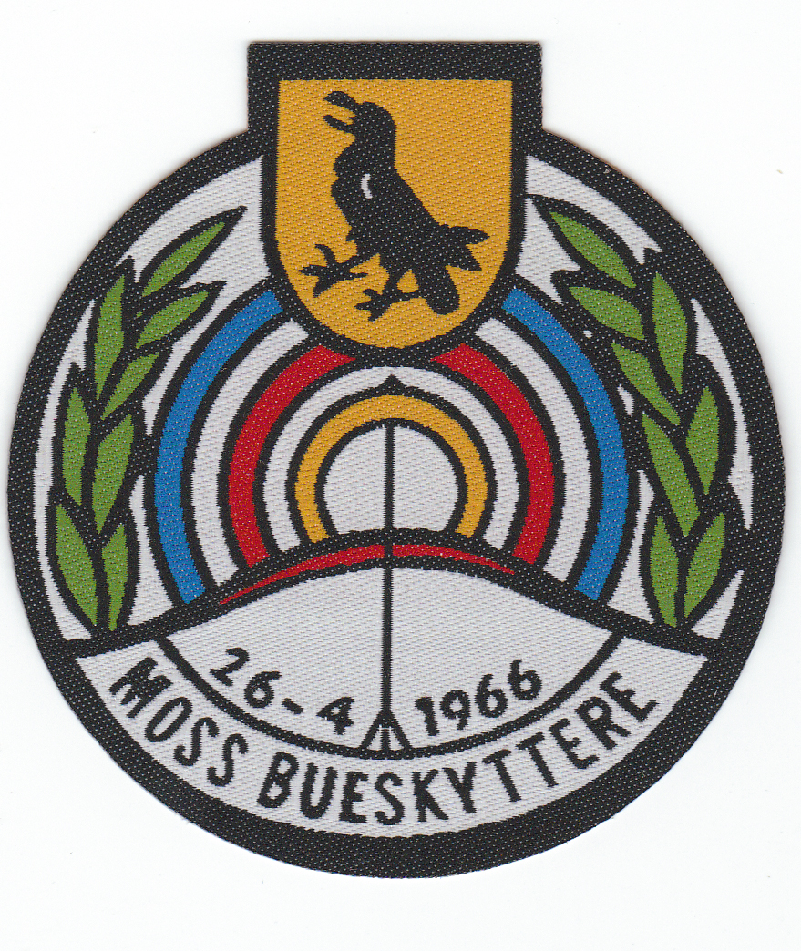 Moss bs logo